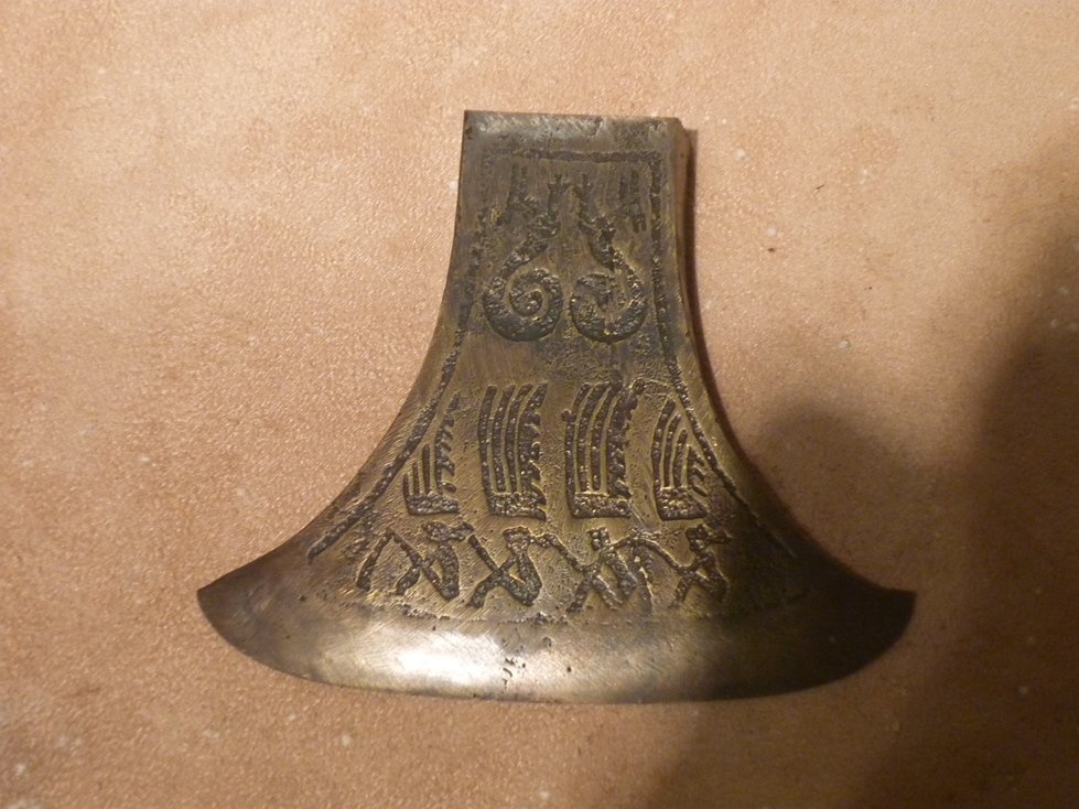 战国羽人竞渡斧，1976年出土于宁波市鄞县（今鄞州区）甲村